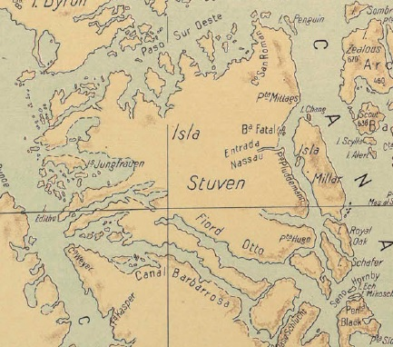 La imagen es un detalle del “Atlas Centenario”, desarrollado por la Oficina de Mensura de Tierras del Gobierno de Chile dirigida por don Luis Risopatrón con ayuda de los cartógrafos Nicanor Boloña y Luis Ossandón. Esta obra fue desarrollada por orden del Presidente de la República don Pedro Montt y publicada en el año del centenario de la república en 1910.